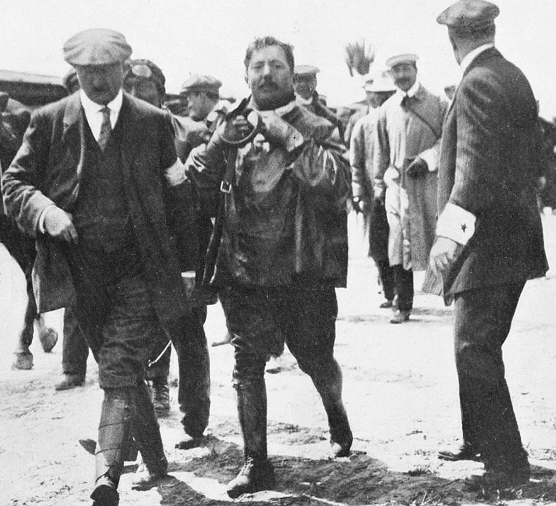 George Boillot, vainqueur du Grand Prix de l'A.C.F. 1912 (La Vie au Grand Air, du 29 juin 1912, p.505)